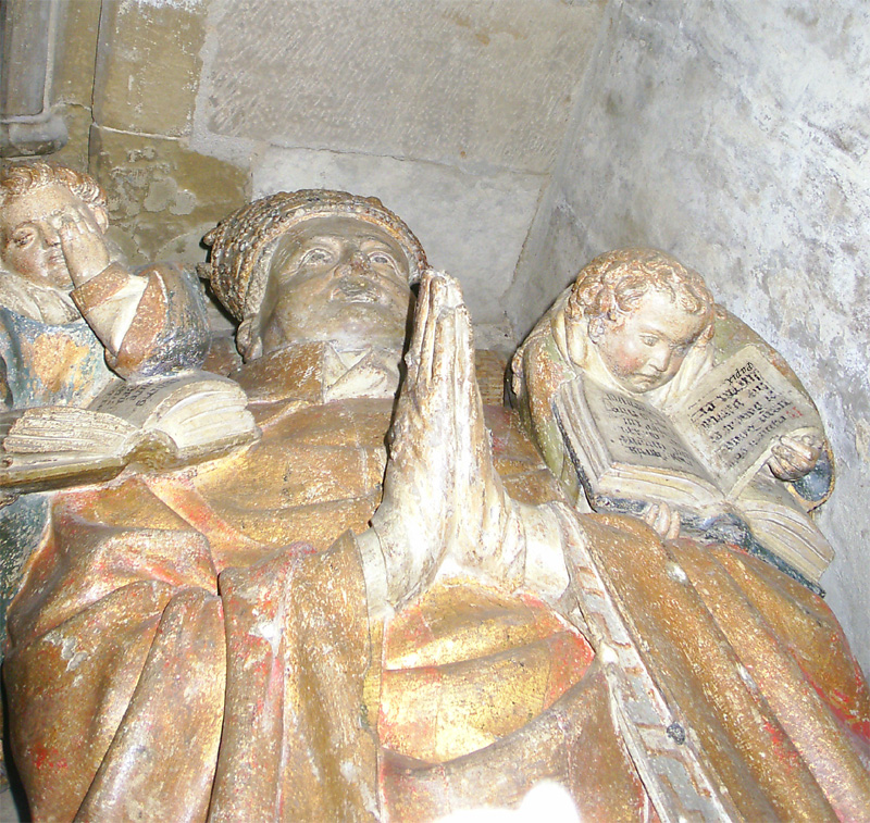 Estatua de Don Sancho Sánchez de Oteiza ( sepulcro), que se encuentra en la Catedral de Tudela - Navarra - España